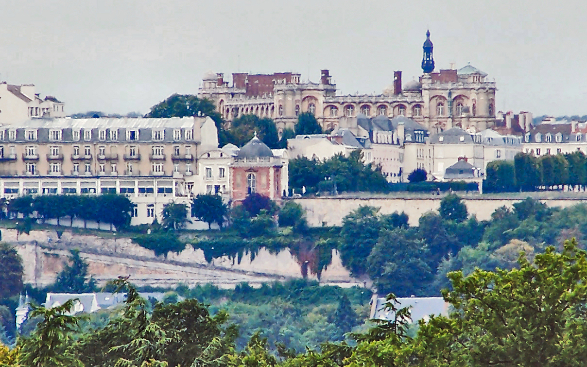 chateau de st-germain en laye, vu de Chatou